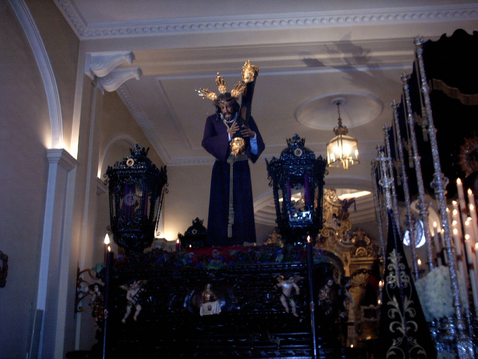 Jesús del Gran Poder de Dos Hermanas, en su capilla, el día de su salida en penitencia